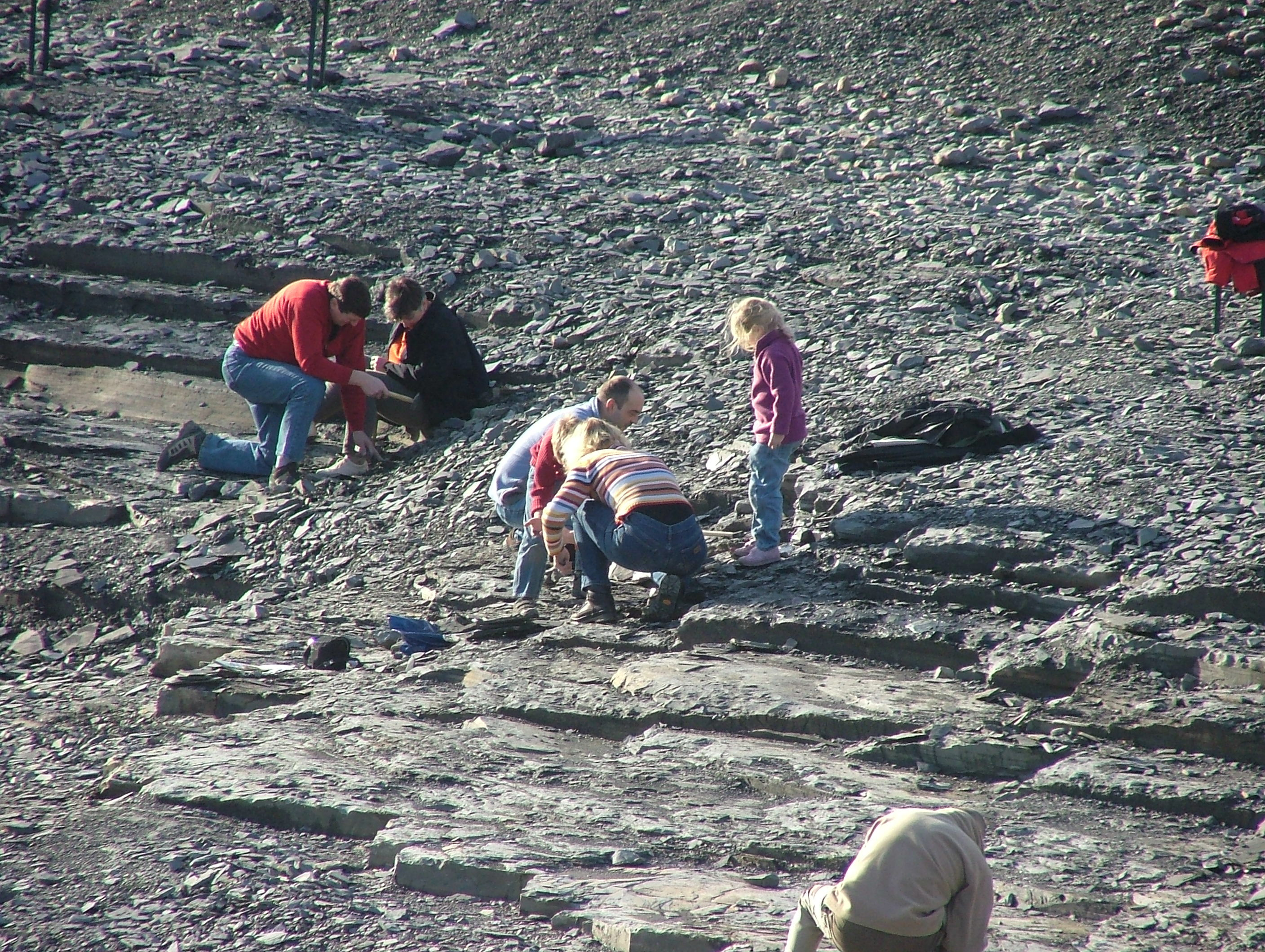 Auf der Suche nach Versteinerungen in Holzmaden